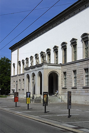 Oskar Reinhart Museum in Winterthur (Nr. 03.1-5458)